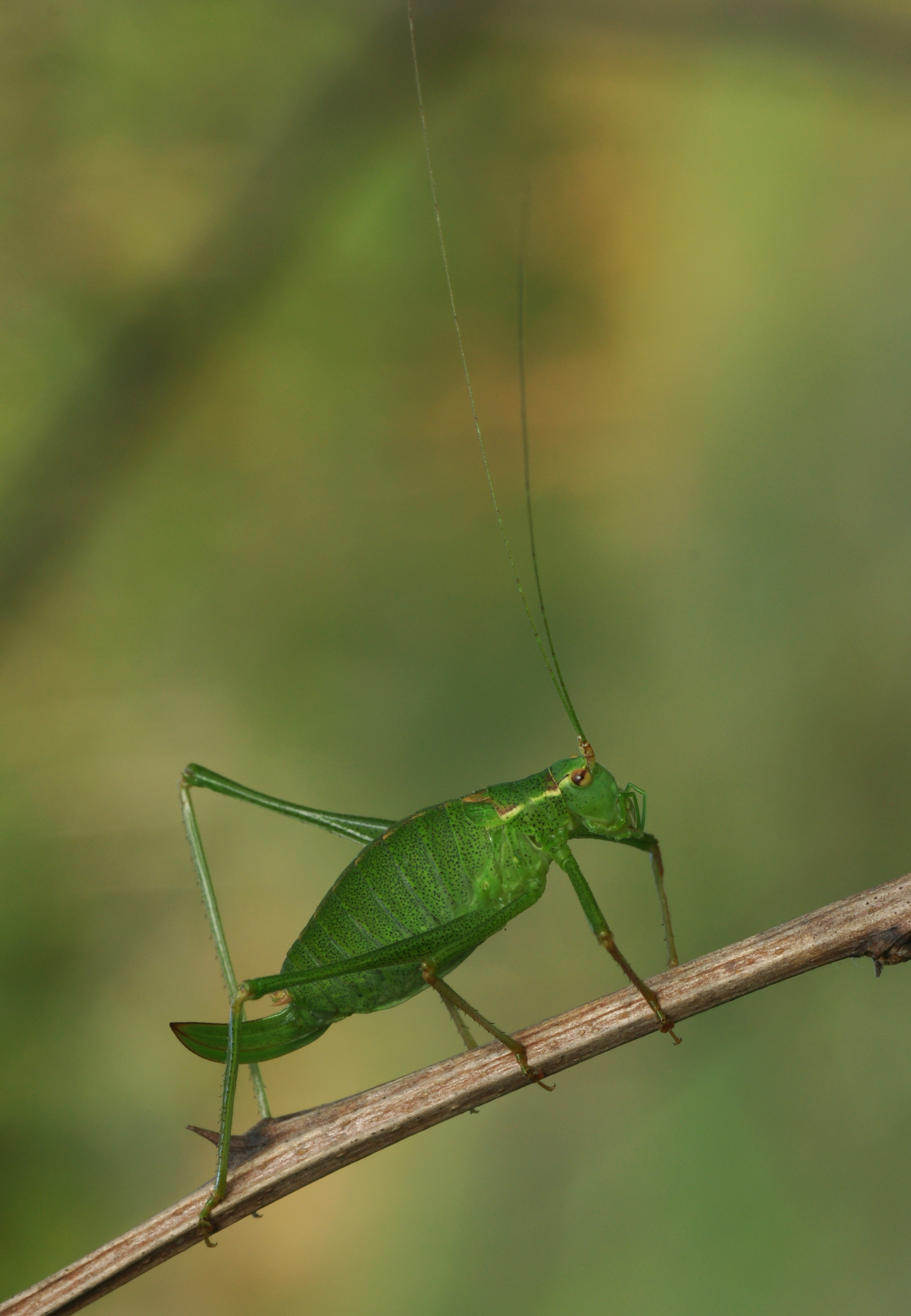 Ordnung: Langfühlerschrecken (Ensifera) Familie: Laubheuschrecken (Tettigoniidae) Unterfamilie: Sichelschrecken (Phaneropterinae) Gattung: Leptophyes Art: Punktierte Zartschrecke (Leptophyes punctatissima)